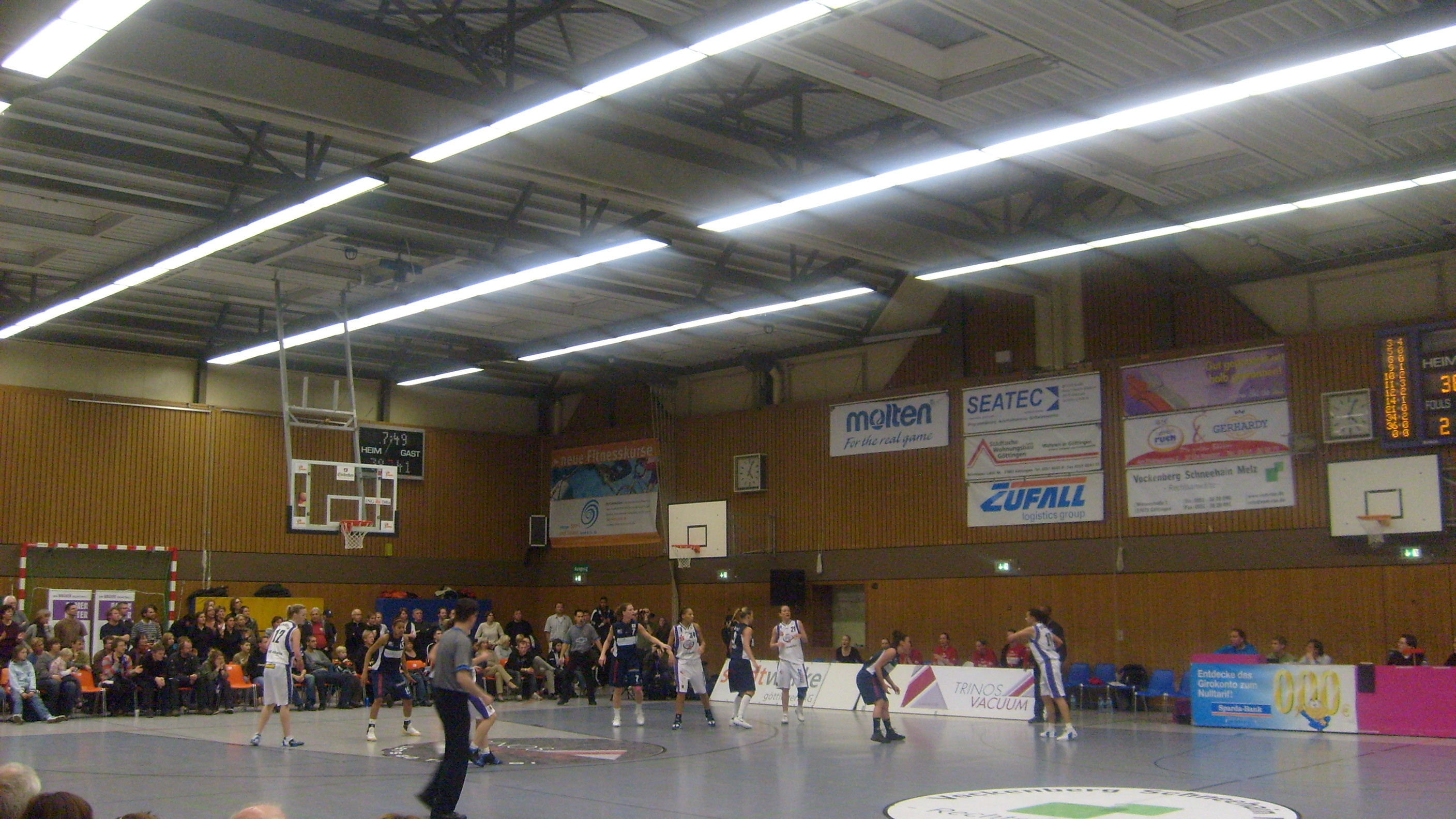 Spielszene im FKG